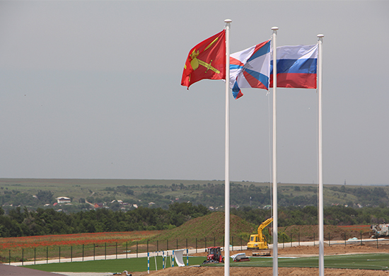 Строительная площадка дивизии